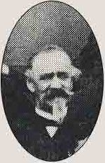 Giuseppe Badoni, imprenditore lecchese del distretto del ferro, fine XIX sec.